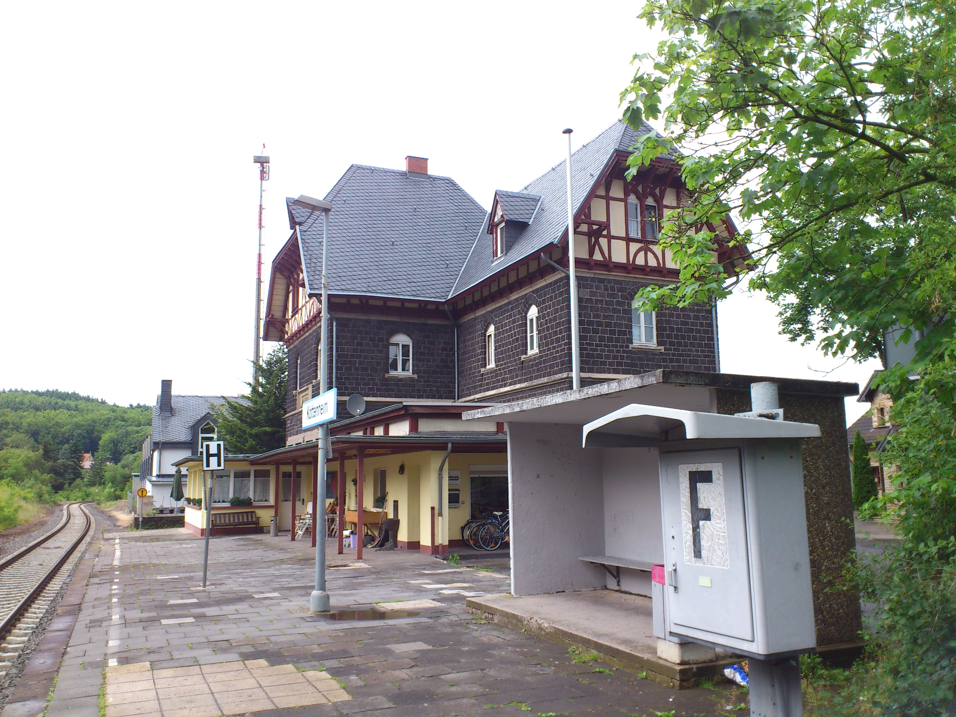 Der Bahnhof von Kottenheim im Jahr 2012/Kottenheim Station 2012